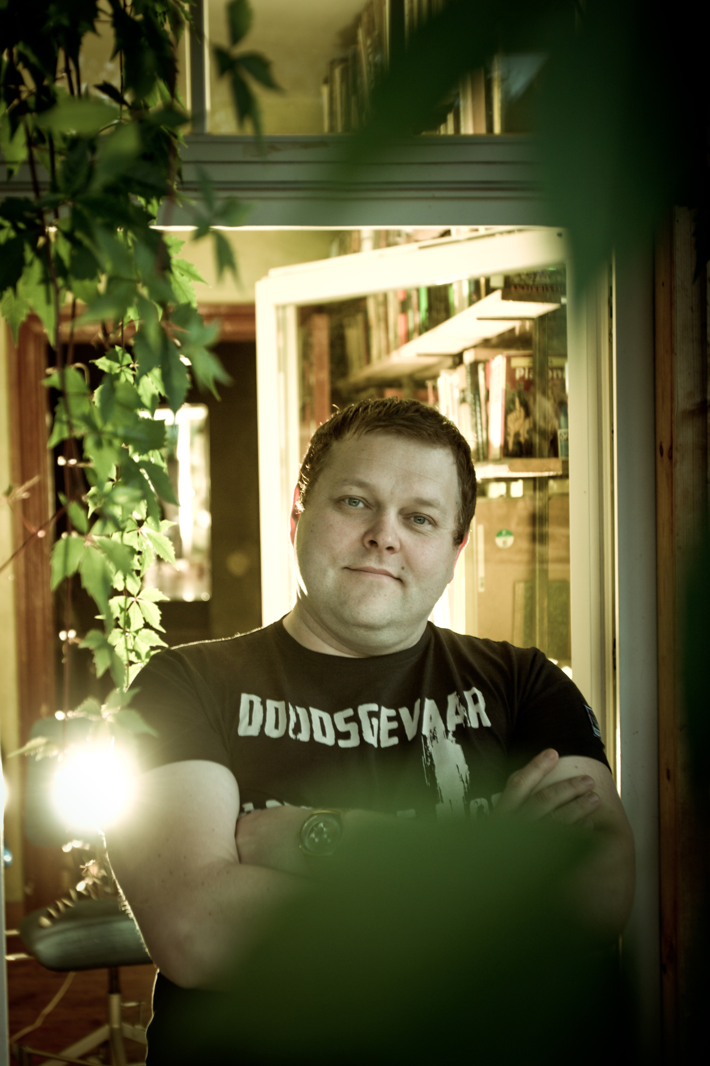 Näitleja ja literaat Rein Pakk